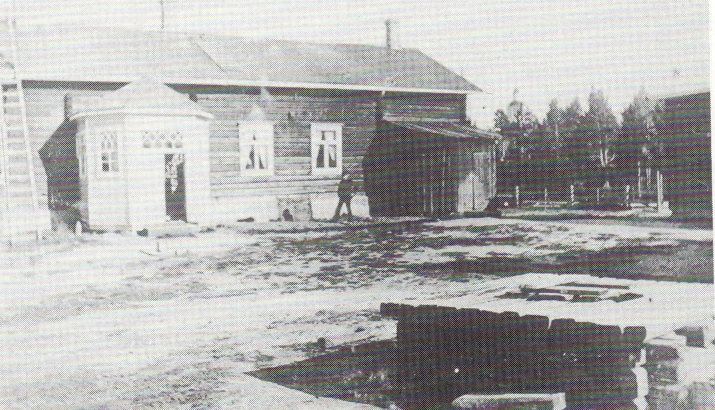 Kempeleen Kirkonkylän kansakoulu kuvattuna vuonna 1896. Rakennus valmistui vuosien 1883–1885 aikana.